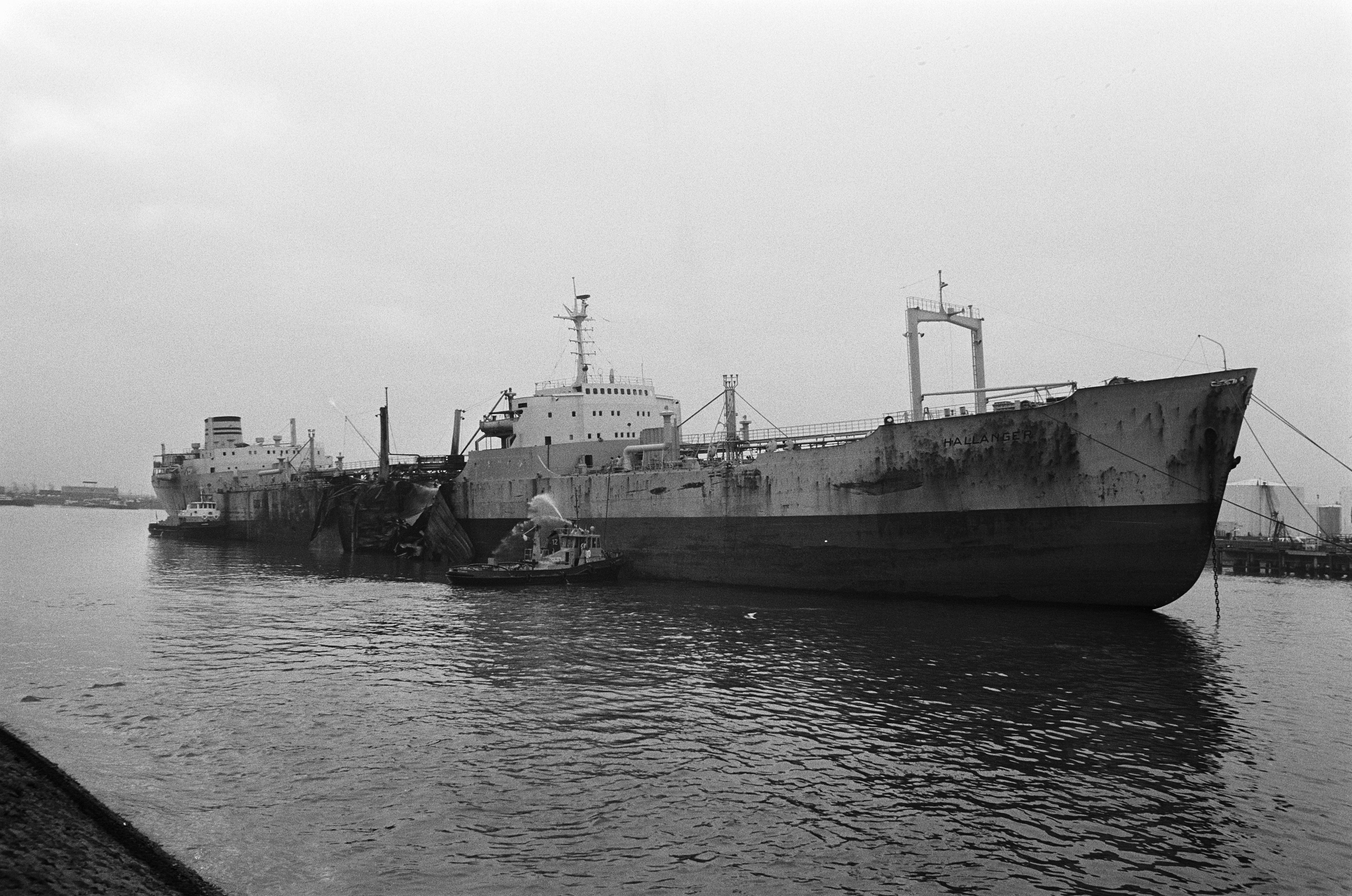 Collectie / Archief : Fotocollectie Anefo Reportage / Serie : [ onbekend ] Beschrijving : Ontploffing aan boord van Noorse tanker in haven van Rotterdam, groot gat in zijkant van tanker Datum : 30 januari 1973 Locatie : Rotterdam, Zuid-Holland Trefwoorden : havens, ontploffingen, tankers Fotograaf : Verhoeff, Bert / Anefo Auteursrechthebbende : Nationaal Archief Materiaalsoort : Negatief (zwart/wit) Nummer archiefinventaris : bekijk toegang 2.24.01.05 Bestanddeelnummer : 926-1909